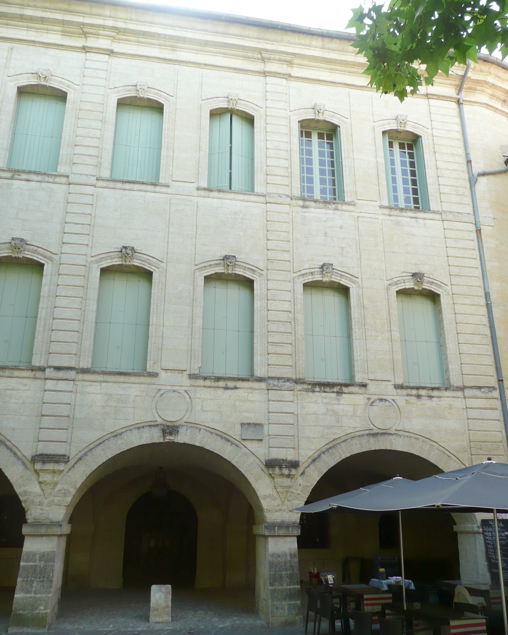 Uzès (Gard, France), au 26 de la place aux Herbes, hôtel particulier de la Rochette, construit au début du XVIIIe siècle.